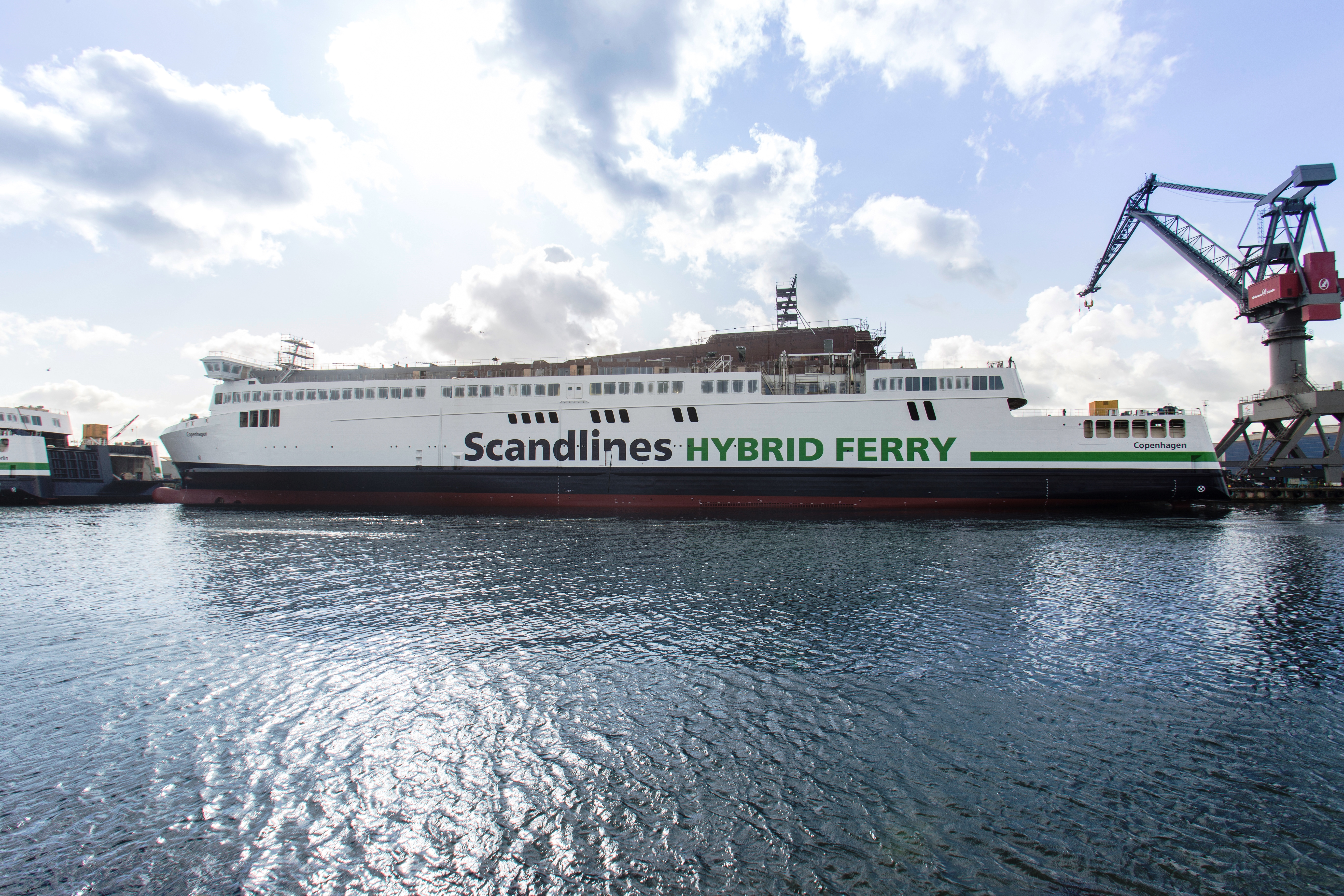 Scandlines Fähre Coopenhagen bei Bau in der Werft in Munkebo